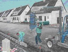 rue du rosoir lors de la rénovation de la chaussée en 2006